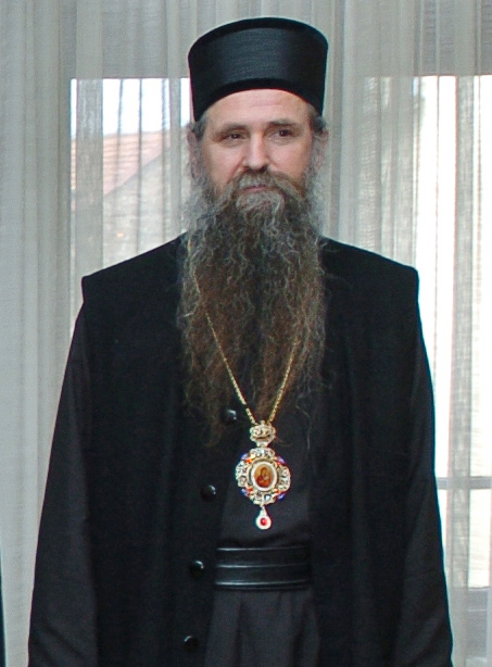 Епископ Иоанникий (Мичович)